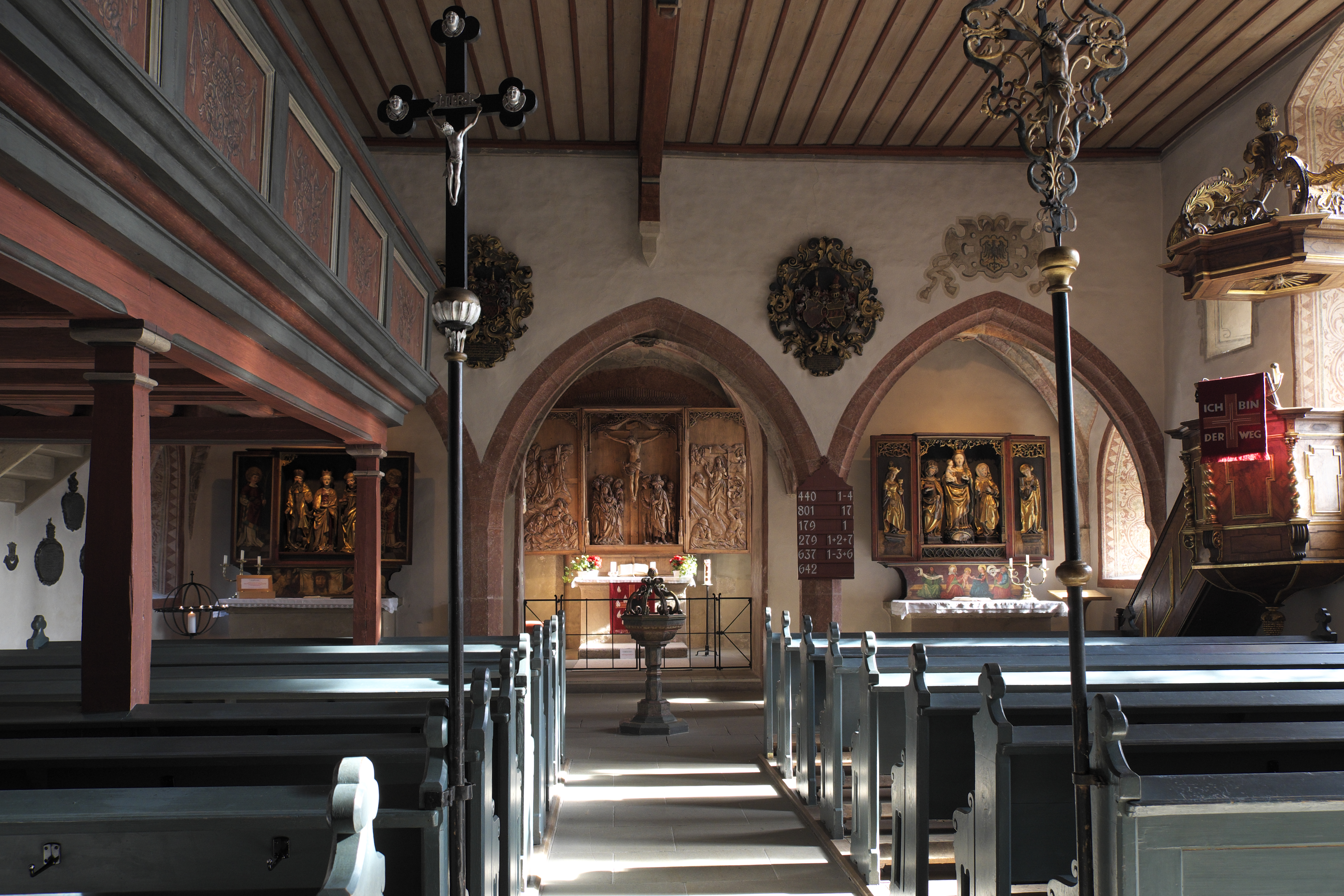 Evangelisch-Lutherische Kirche St. Peter und Paul in Detwang, einem Stadtteil von Rothenburg ob der Tauber in Mittelfranken (Bayern), Innenraum